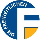 Die Freiheitlichen